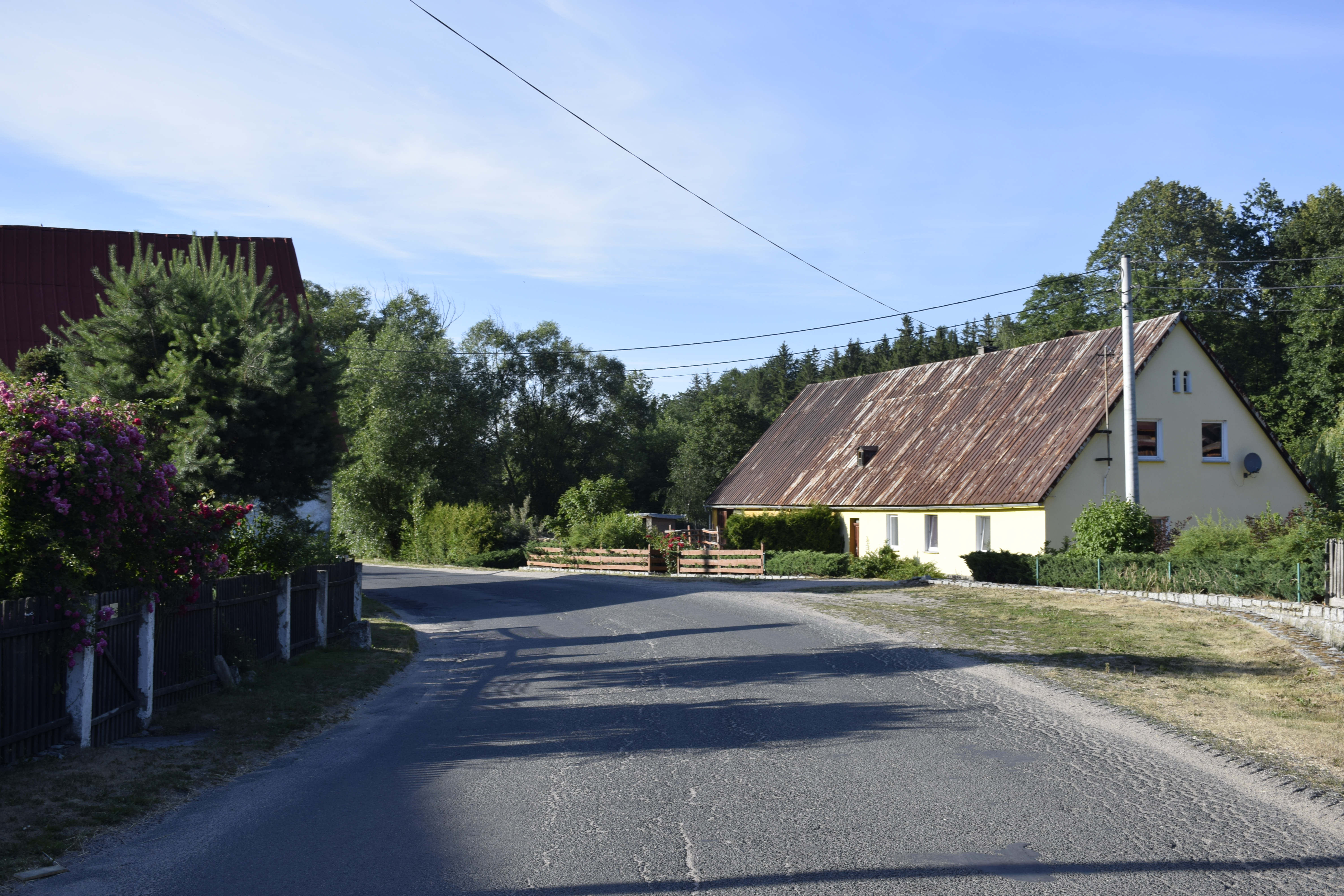 Krogulec (województwo dolnośląskie). Polska